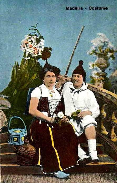 Madeira Costume. Casal de vilões. Bilhete-postal de Manuel Olim Perestrello (?), 1900 (c.). Funchal, ilha da Madeira.